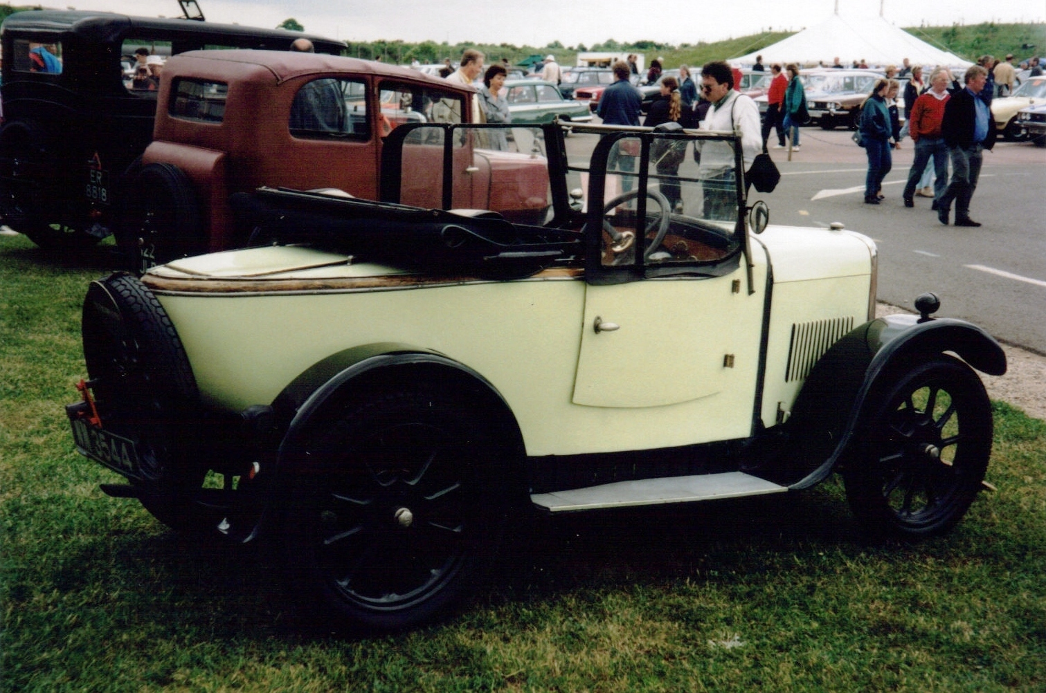 Triumph Super Seven, 1929. Aufgenommen in England. (DVLA) first registered 22 June 1929, 832cc